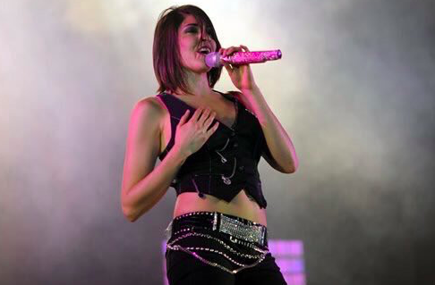 Ha-ash - Habitación Doble Tour